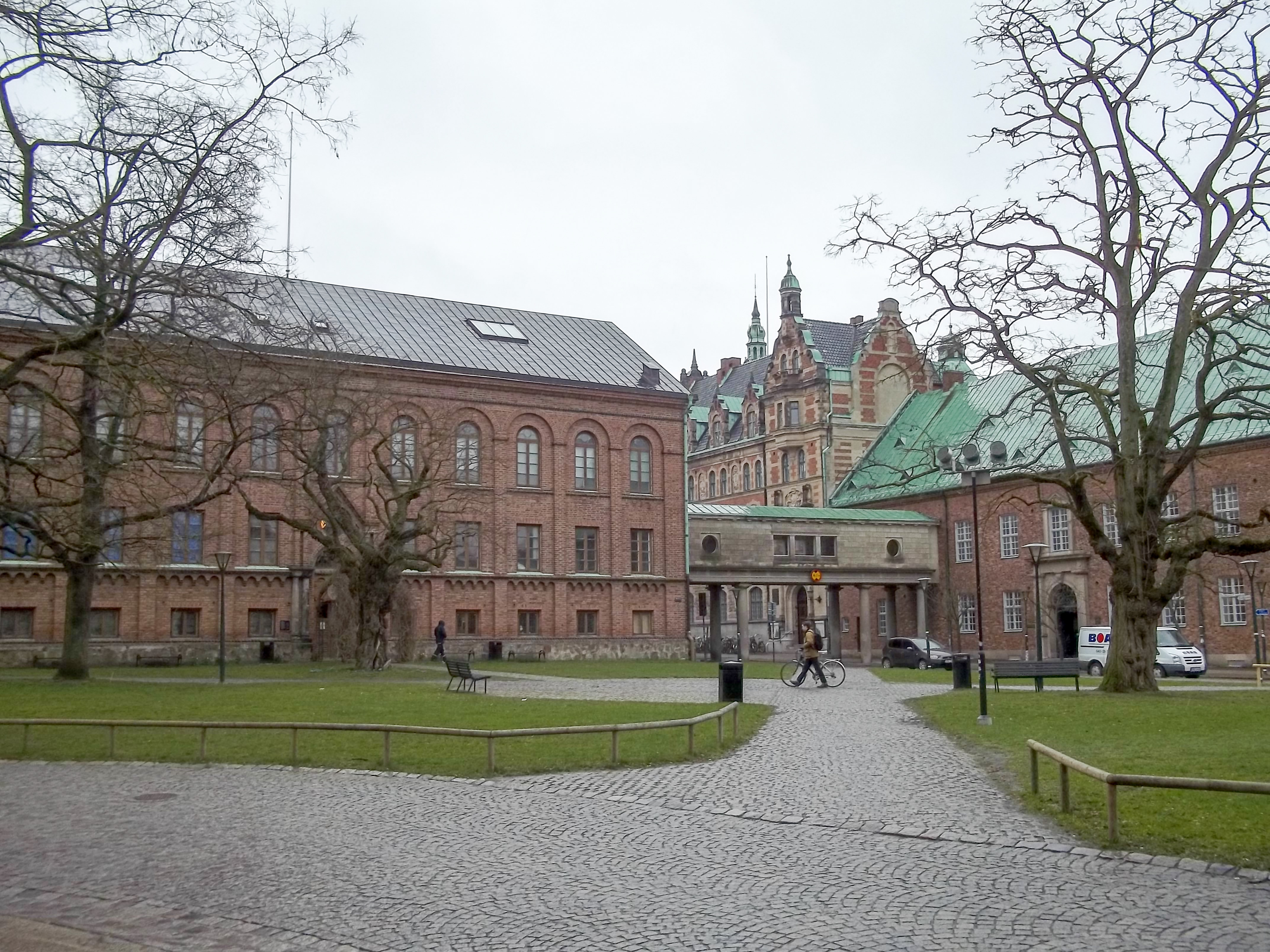 Museo di Storia di Lund